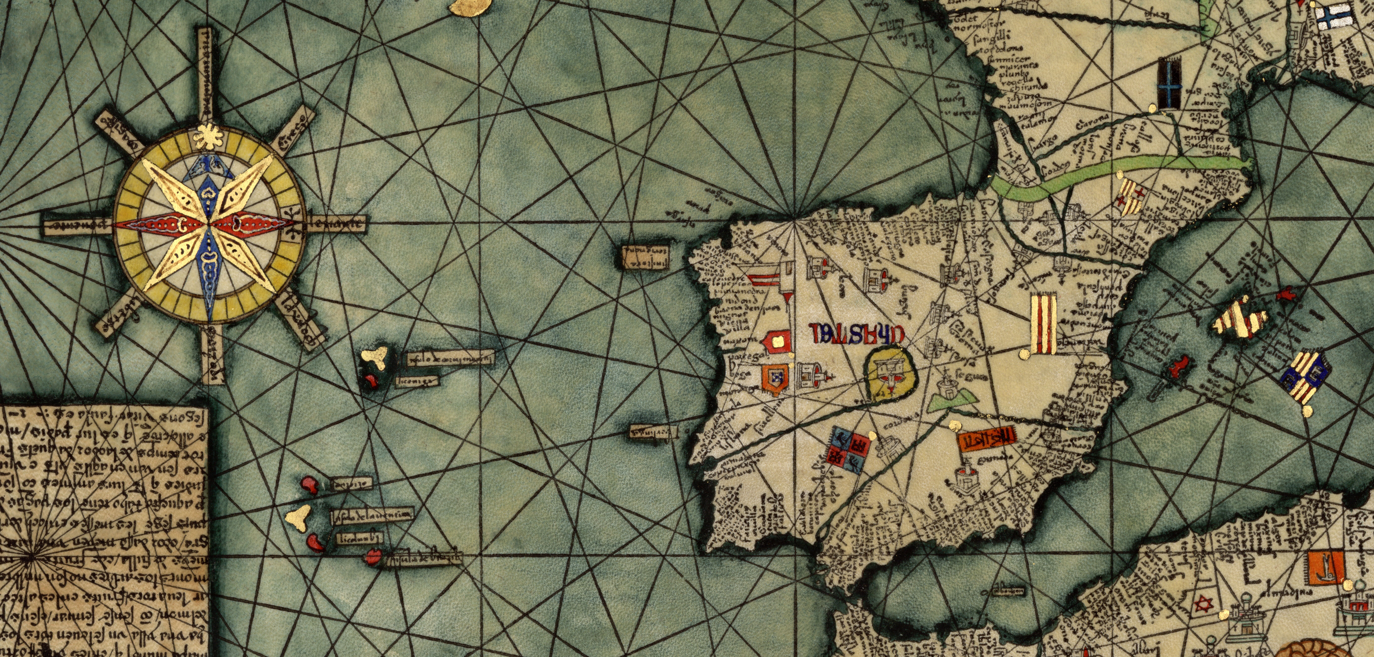 España y el Atlántico en el Atlas catalán de Cresques Abraham. Copia de 1959 del original de 1375.